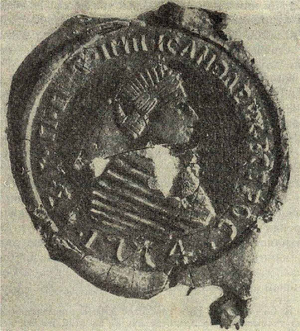 Печать Пугачева (Большая государственная печать Петра Третьего, императора и самодержца всероссийского, 1774)